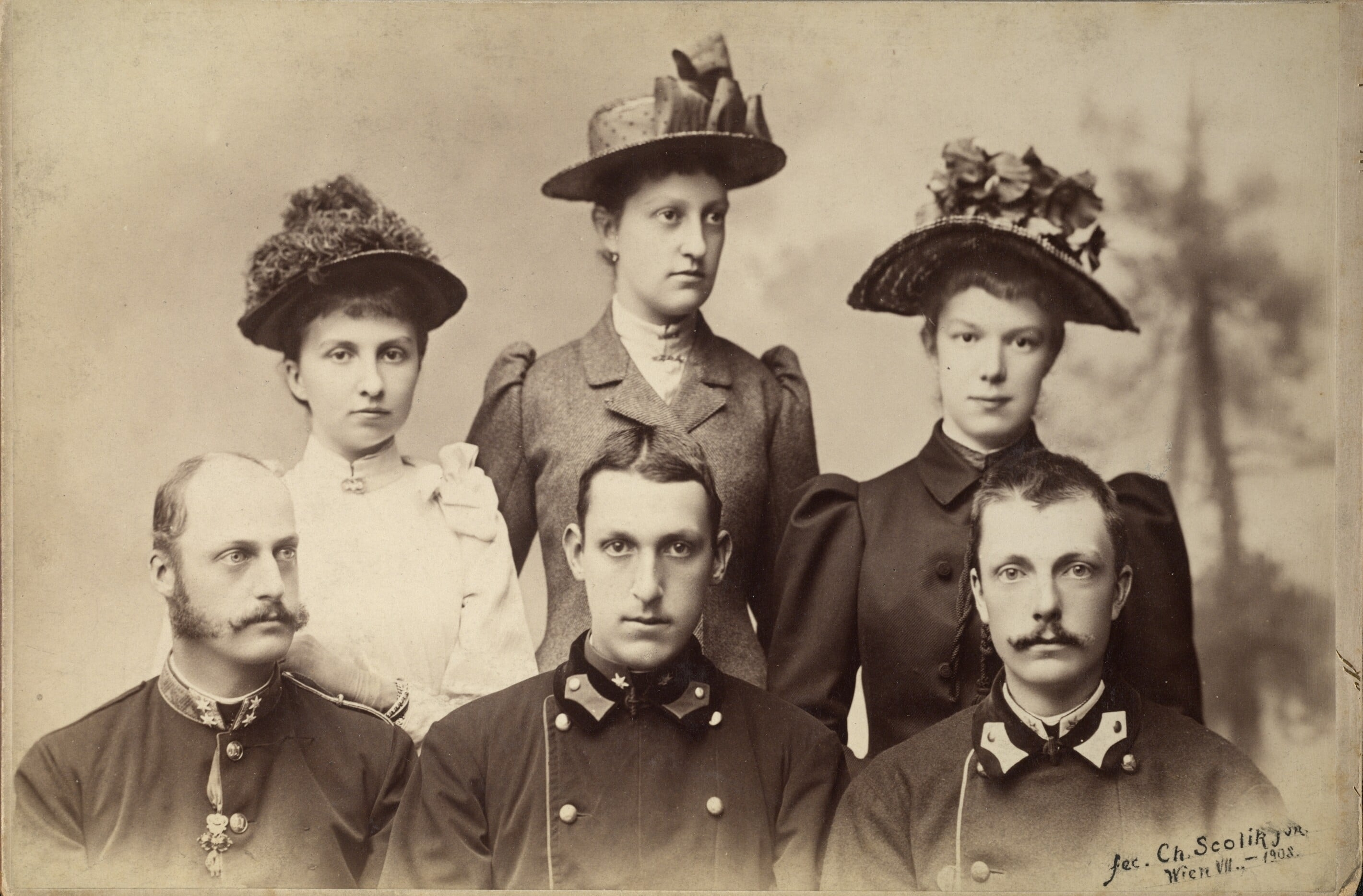 Erzherzog Leopold Salvator von Österreich-Toskana in Gruppe, in Uniform als Oberstleutnant ganz links, daneben seine Brüder Albrecht Salvator und Franz Salvator. Dahinter ganz links seine Gattin Blanka von Castilien, daneben seine Schwester Marai Theresia und seine Schwägerin Marie Valerie.